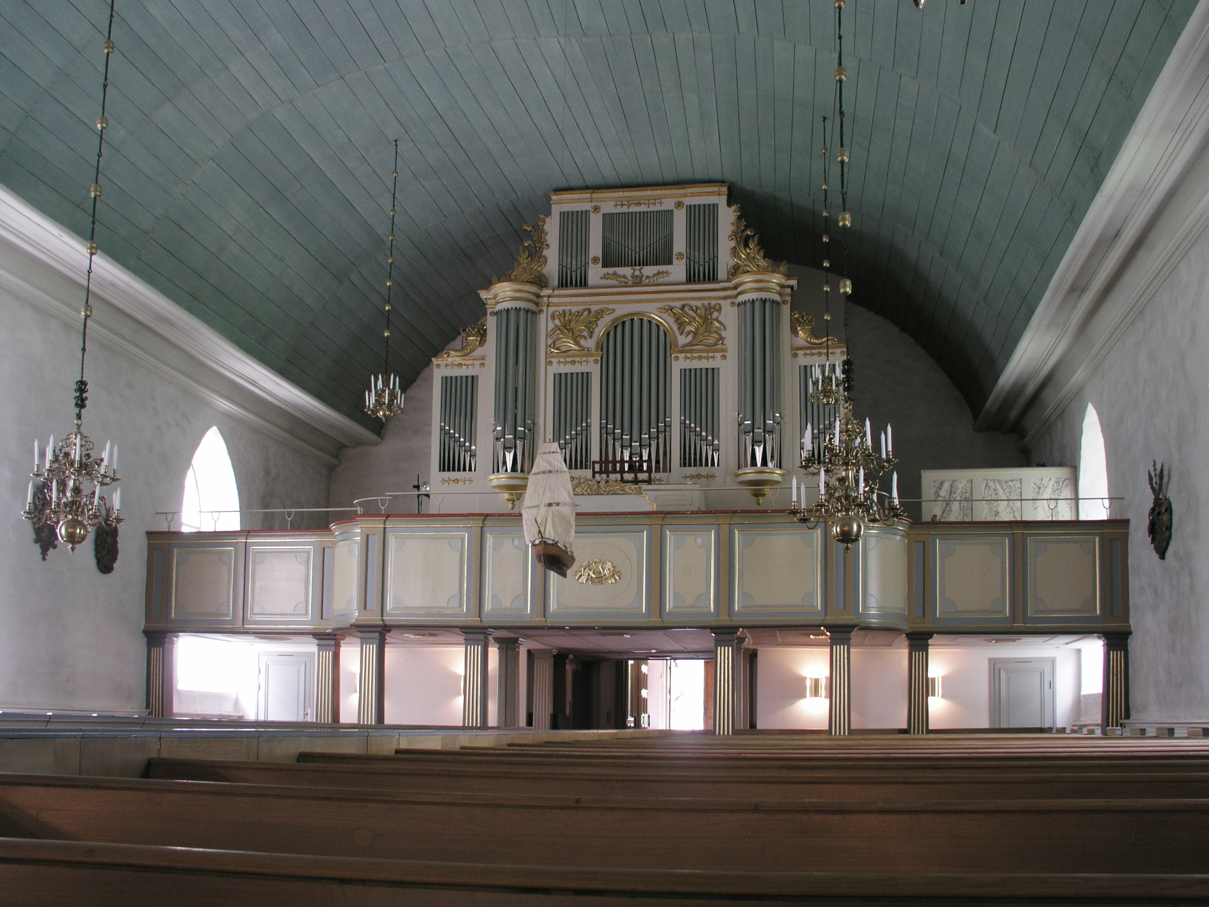 Motala kyrka / Motala church. Nave.